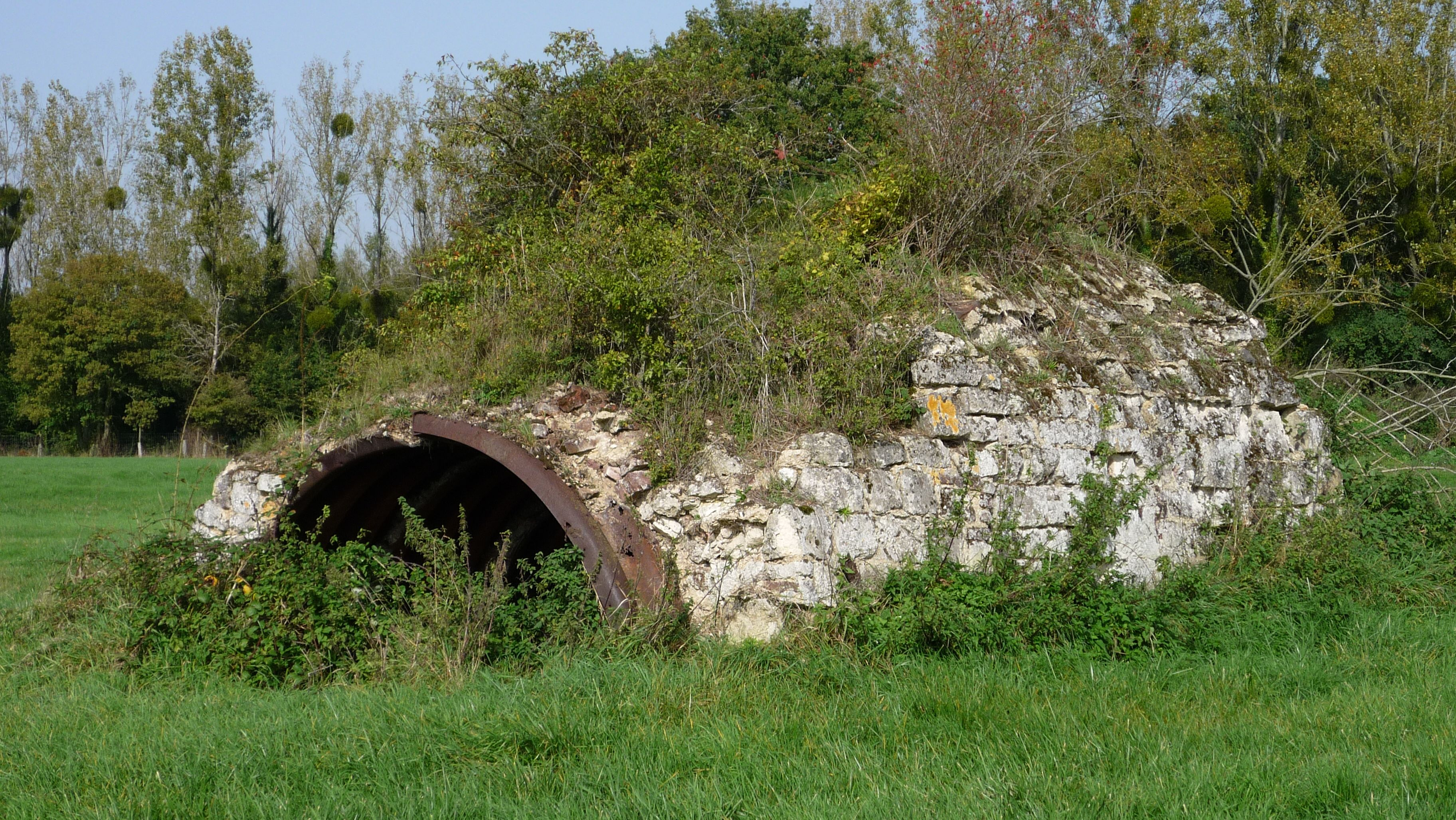 2010 : un métro envahi par la végétation et construit avec des débris de bâtiments rasés en 1917. Des manicampois ont habité ici quelques temps.